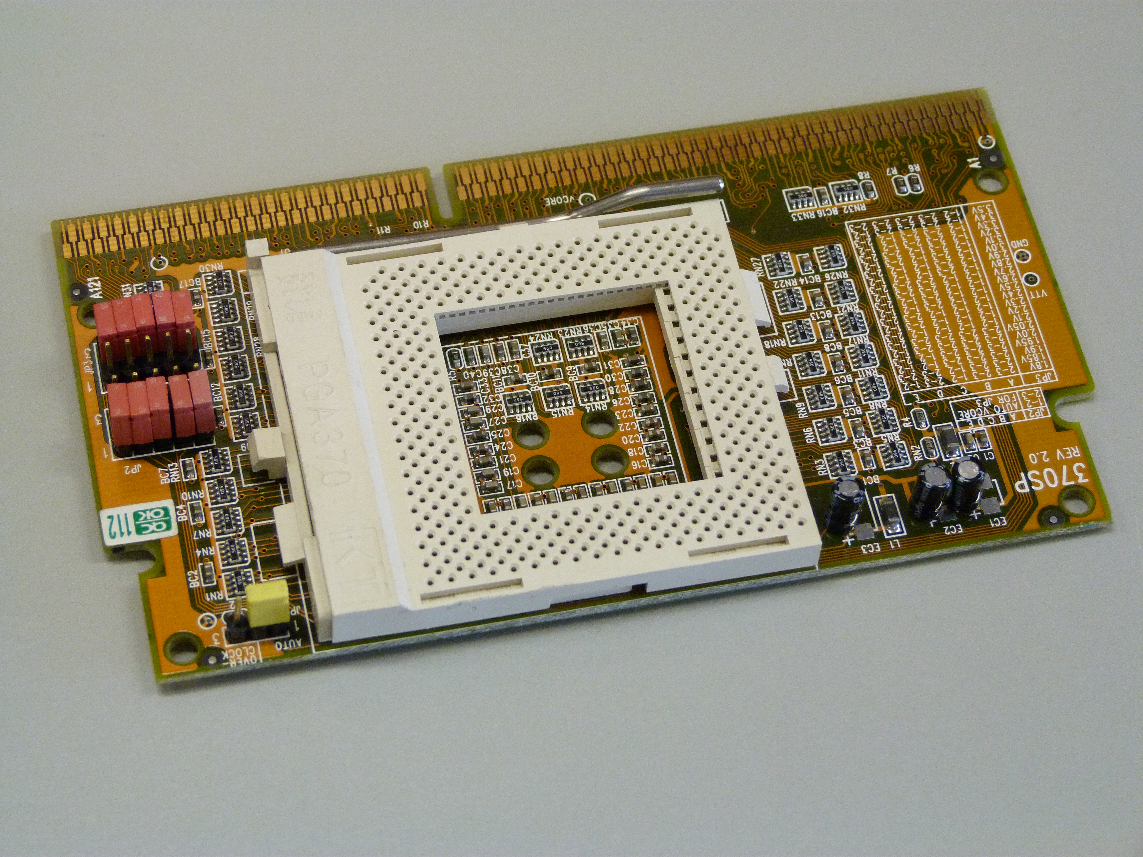 Adapter für Intel Celeron Prozessor mit Übertaktungsmöglichkeit